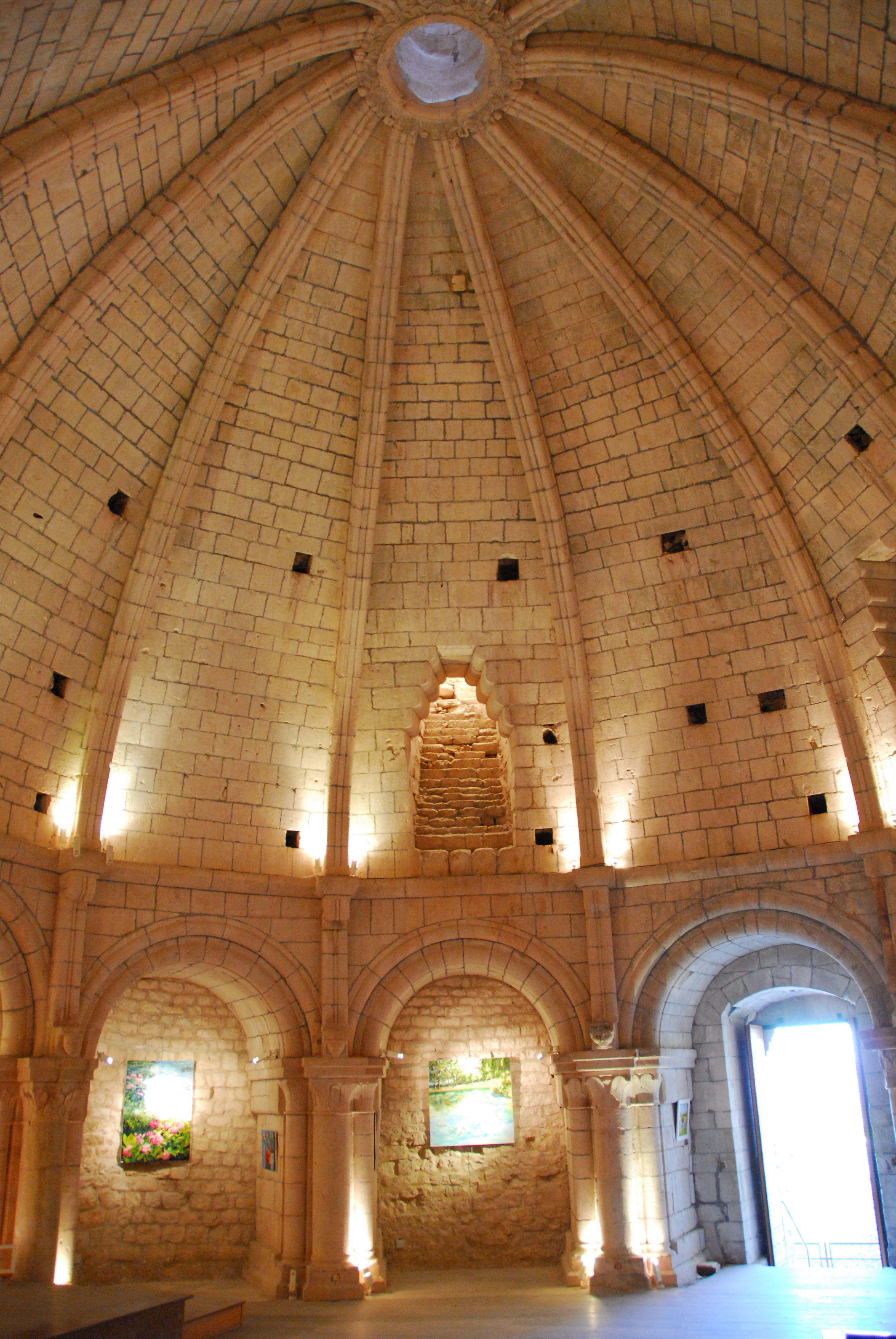 Chateau de Simiane-la-Rotonde, Gewölbesegmente auf Arkaturen